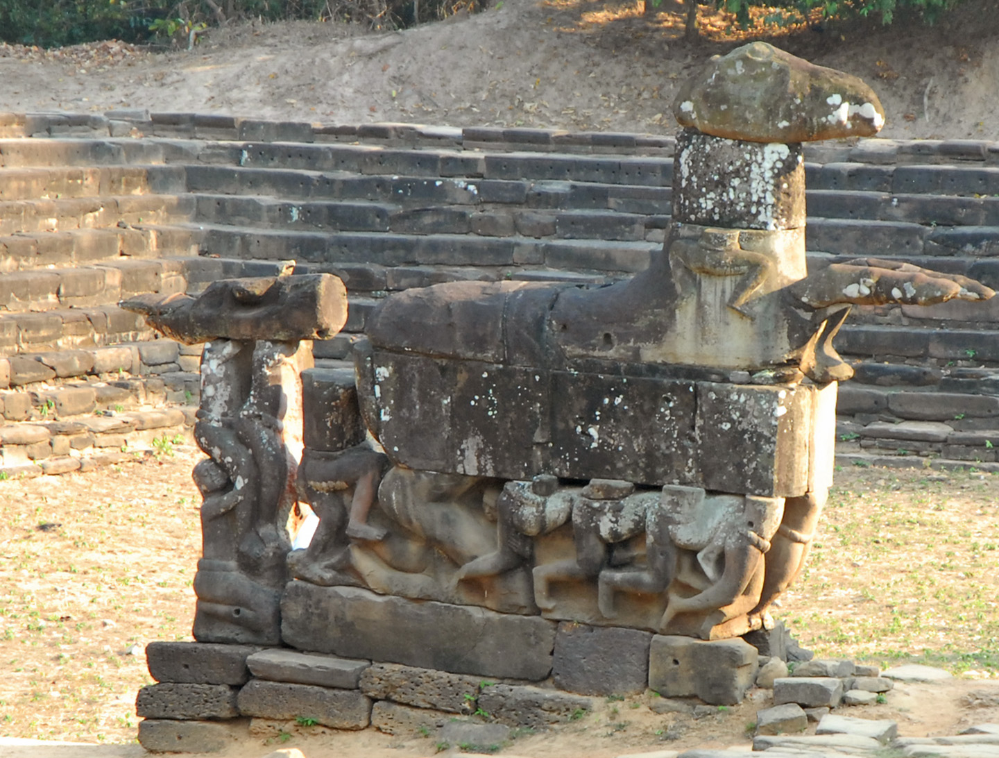 Le cheval volant Bâlaha, métamorphose du Bodhisattva-Lokeshvara - Site de Neak Pean - Siem Reap - Cambodge